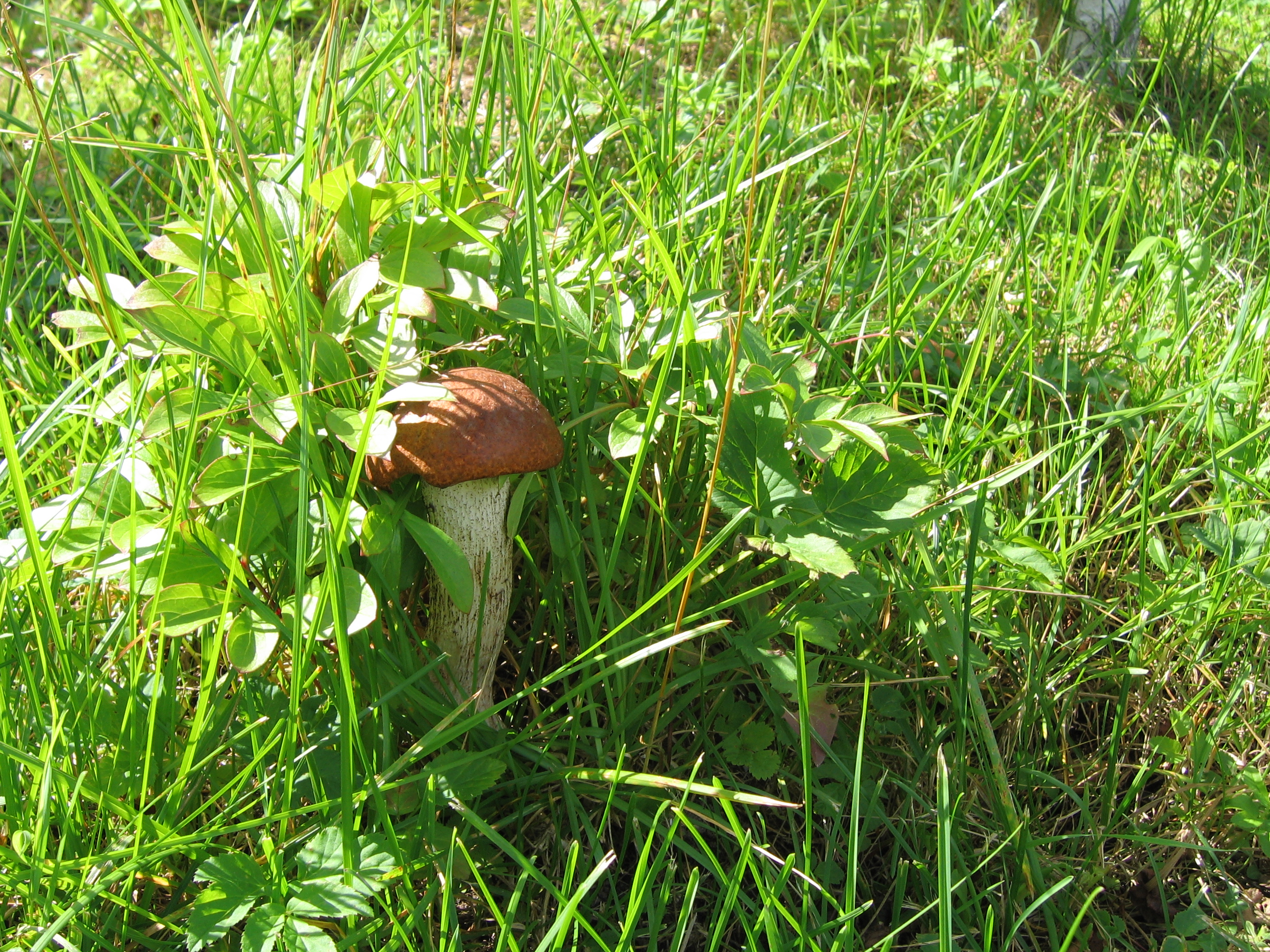 Гриб подосиновик красный в траве